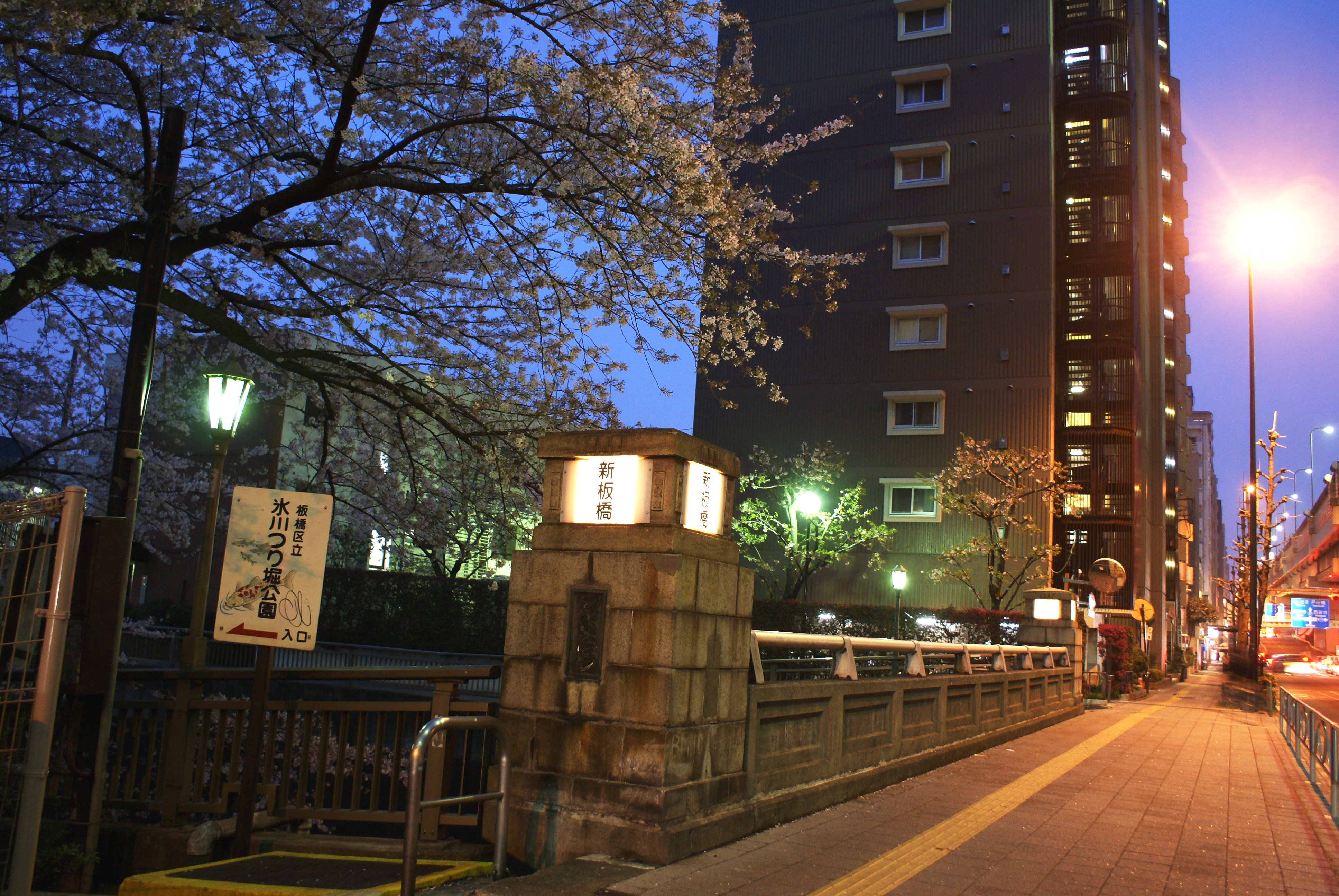 石神井川に架かる国道17号新板橋